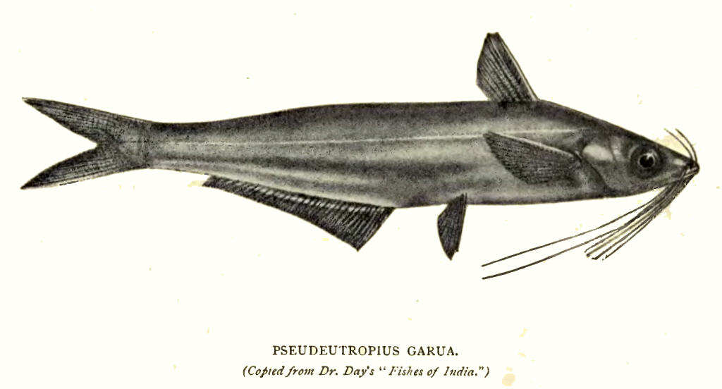 Pseudeutropius garua = Clupisoma garua (Hamilton, 1822)